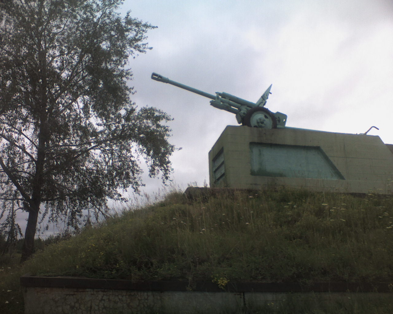 Зенитная установка на постаменте